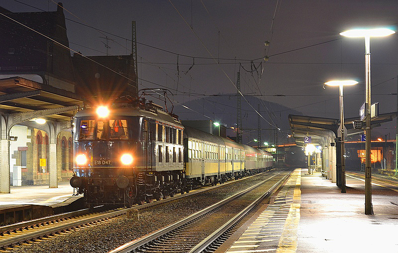 Die Museumslokomotive E18 047 mit einem Sonderzug der Eisenbahnfreunde Treysa im Bahnhof Herborn.